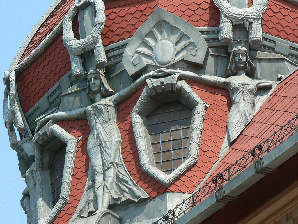 Ungar-Mayer-palota kupola díszei. Szeged, Kárász utca 16. Tervezte: Magyar Ede